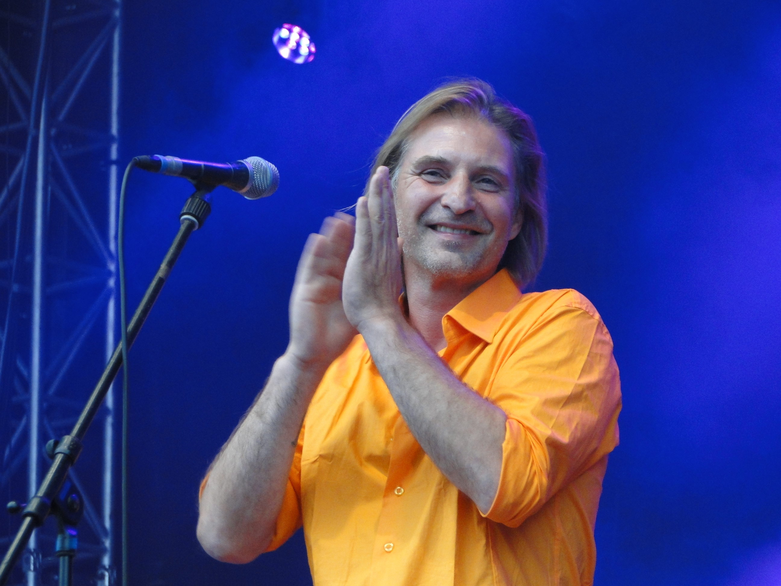 Dirk Zöllner, Frontmann der Gruppe DIE ZÖLLNER, im Jahr 2013